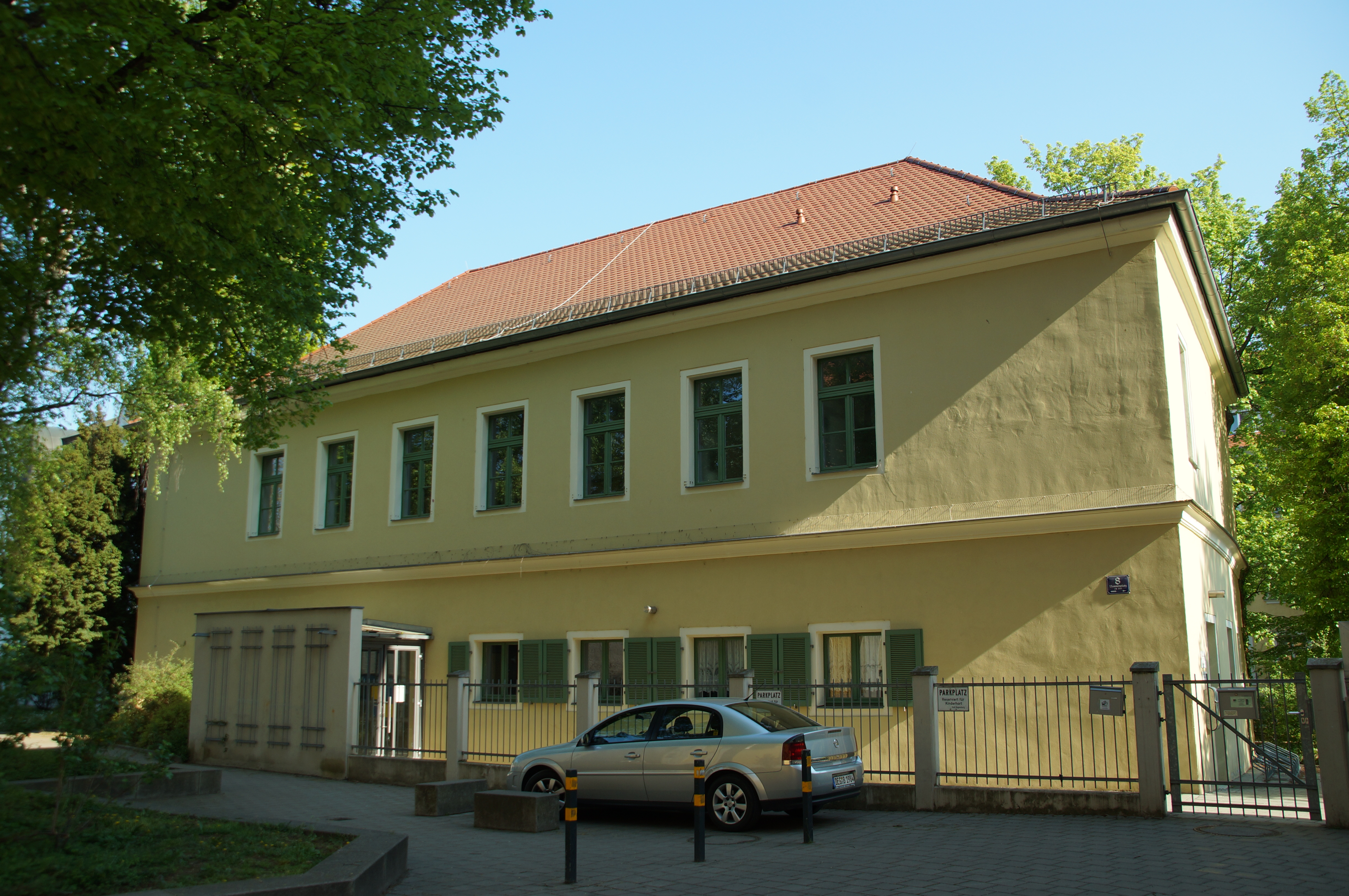 Ehemaliges Gartenpalais, zweigeschossiger und Walmdachbau mit Mittel- und Eckrisaliten auf der Gartenseite, klassizistisch, 1805, wohl von Emanuel Joseph von Herigoyen, Umbauten 1896 und 1959